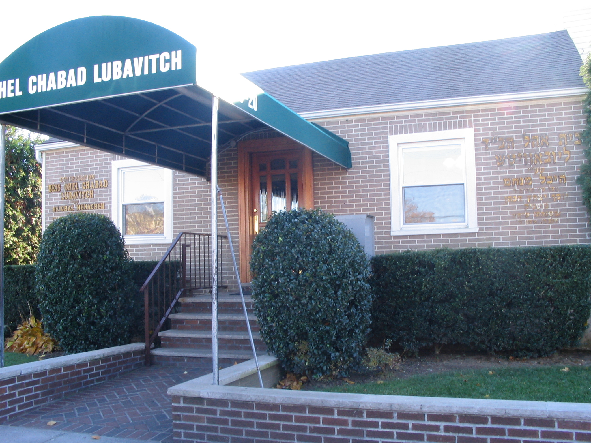 בית אהל חב"ד ליובאוויטש - בית המבקרים שעל יד he:אוהל הרבי מליובאוויטש